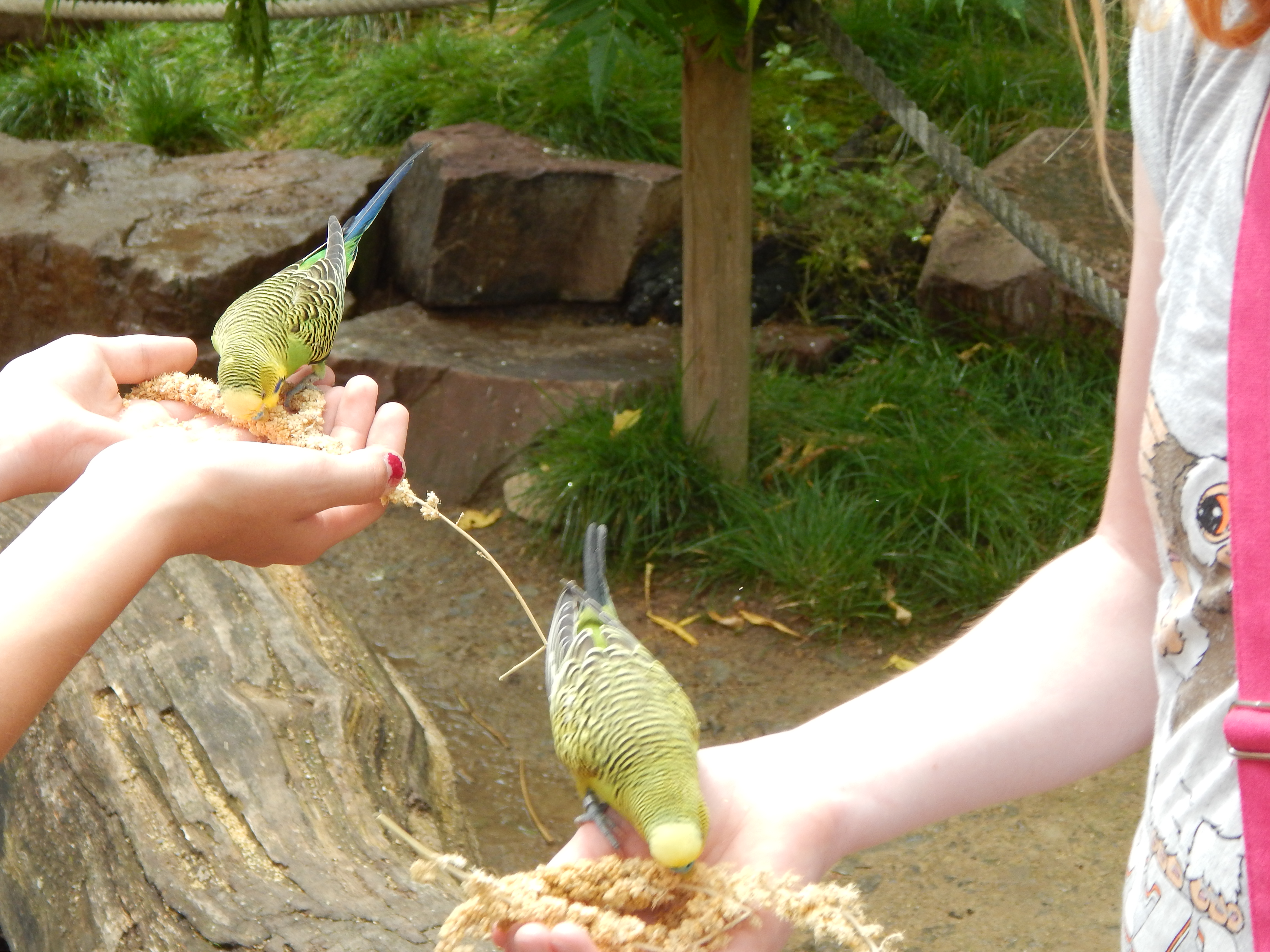 Wellensittiche in Tierpark Sababurg